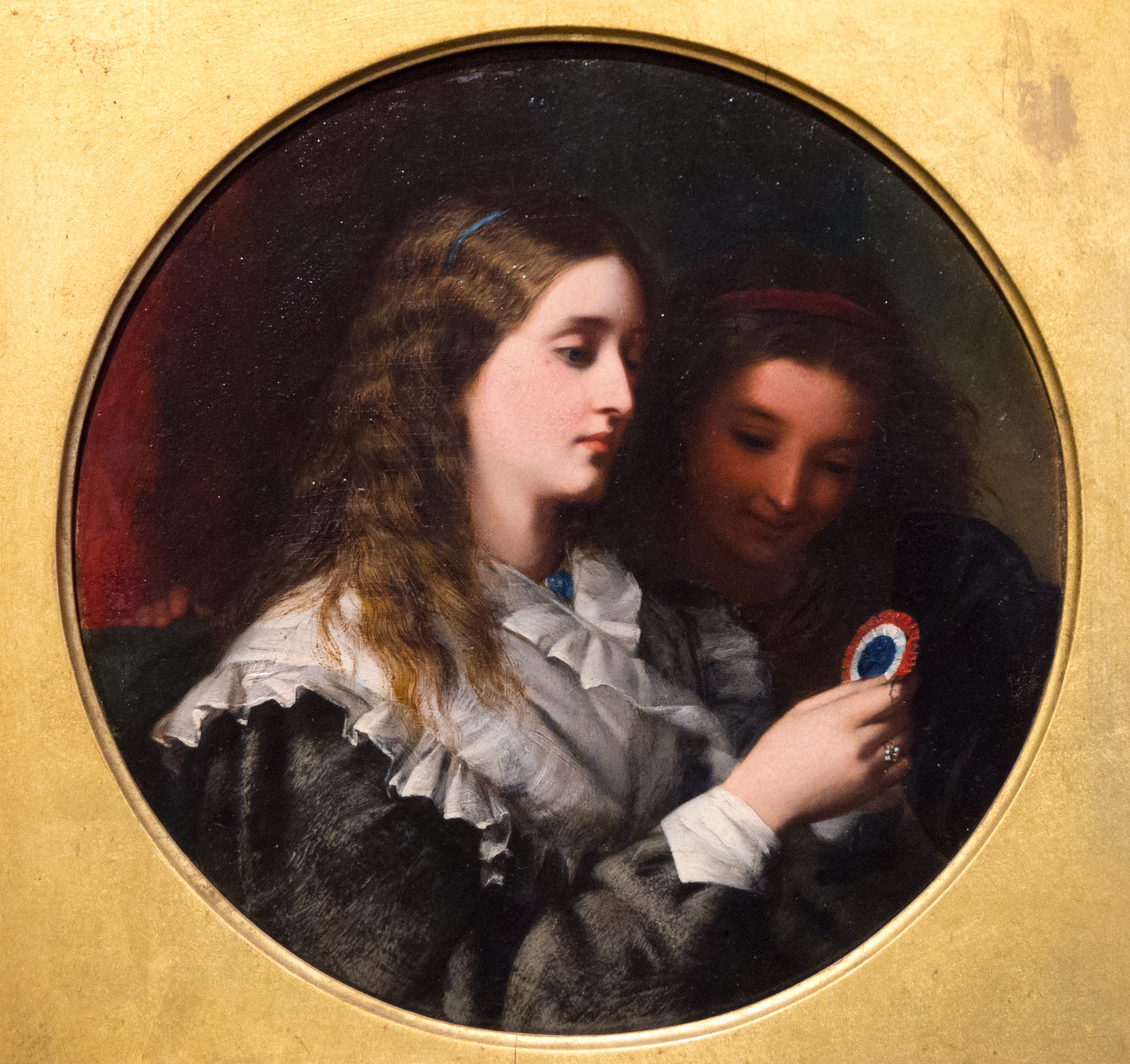 La cocarde de William James Grant (1829 –1866). Représente Josephine de Beauharnais et sa fille Hortense en 1860